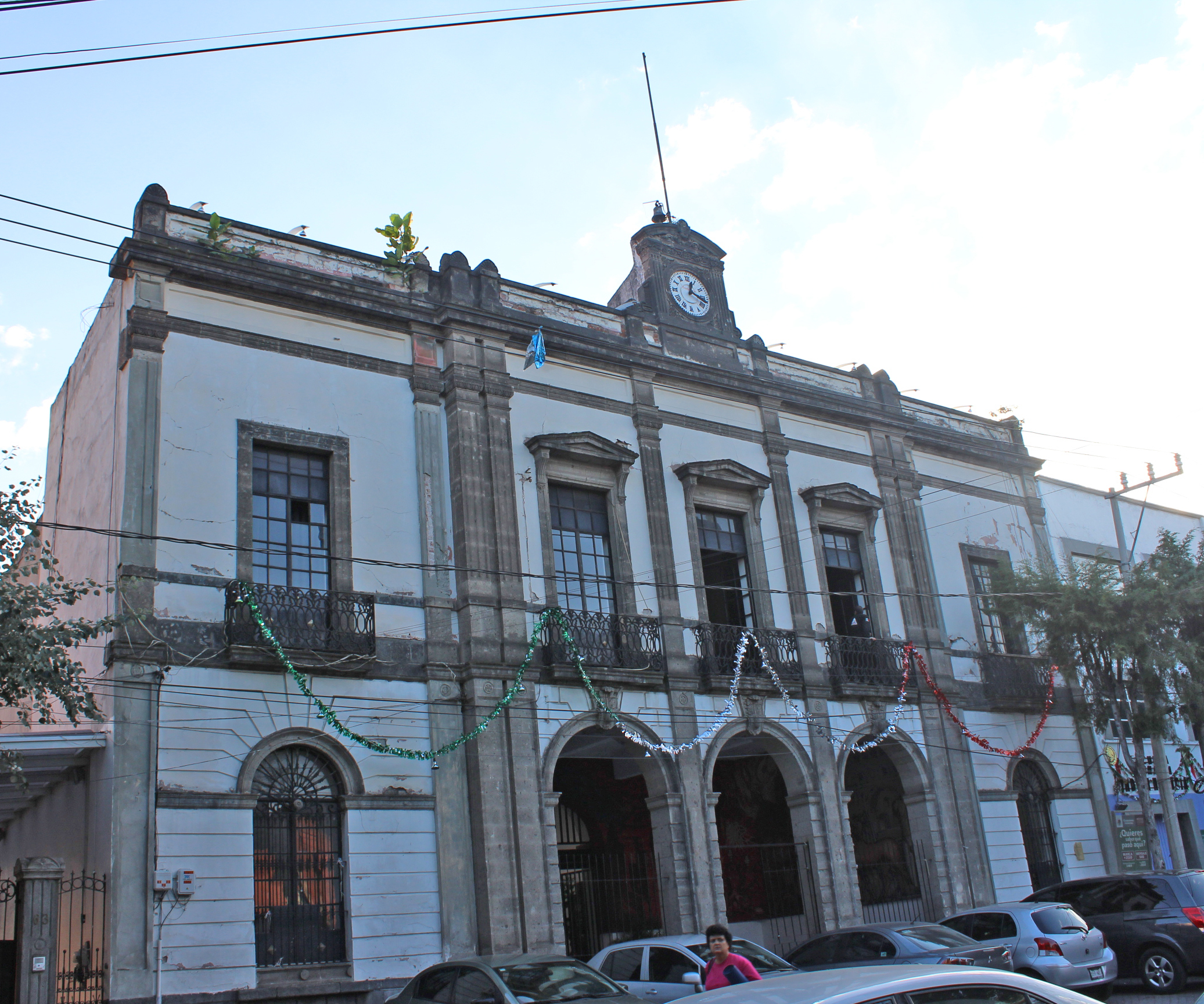 Casa de la Cultura "Juan Rulfo", Benito Juárez, Ciudad de México, México